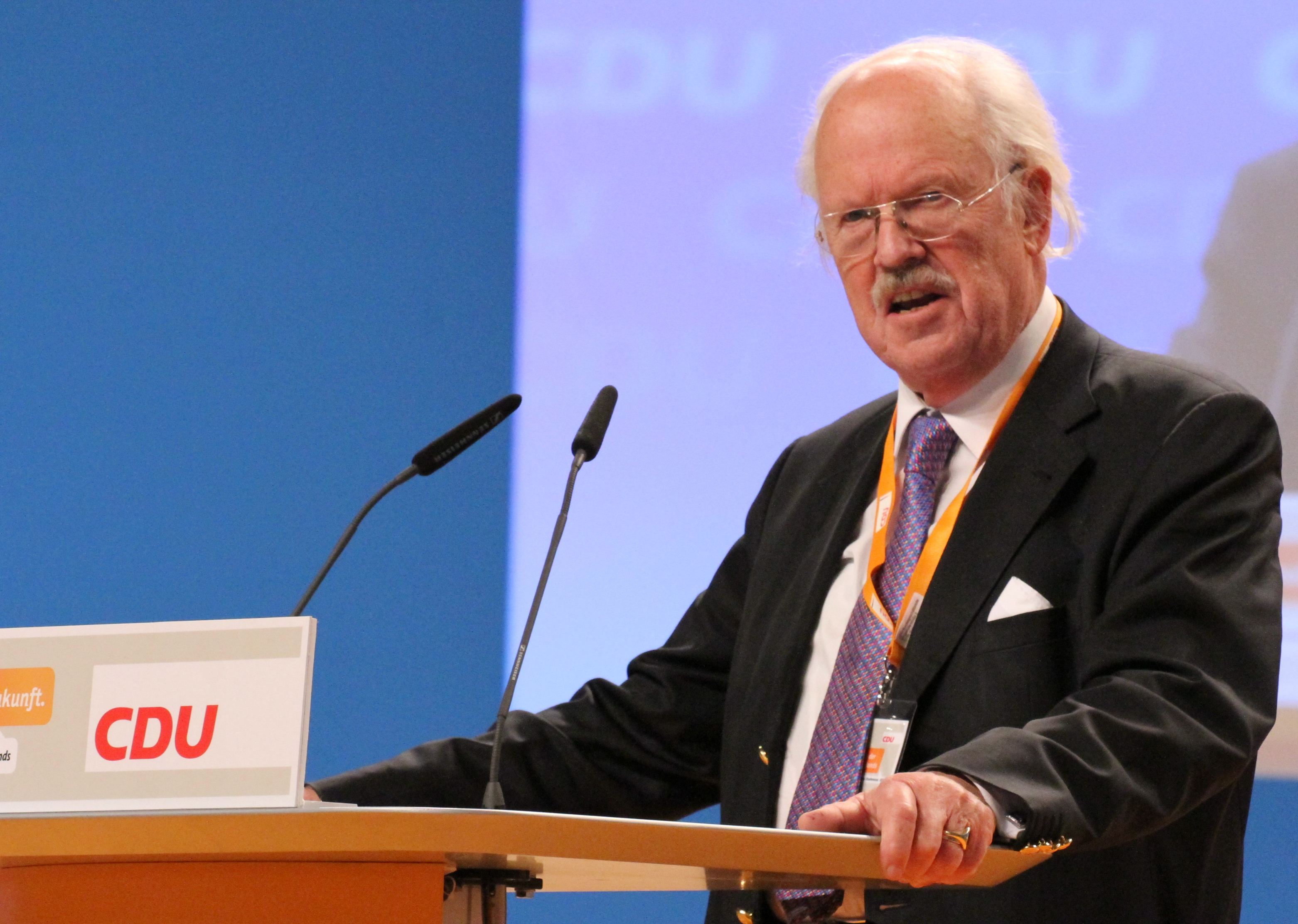 Otto Wulff auf dem CDU Bundesparteitag Dezember 2014 in Köln